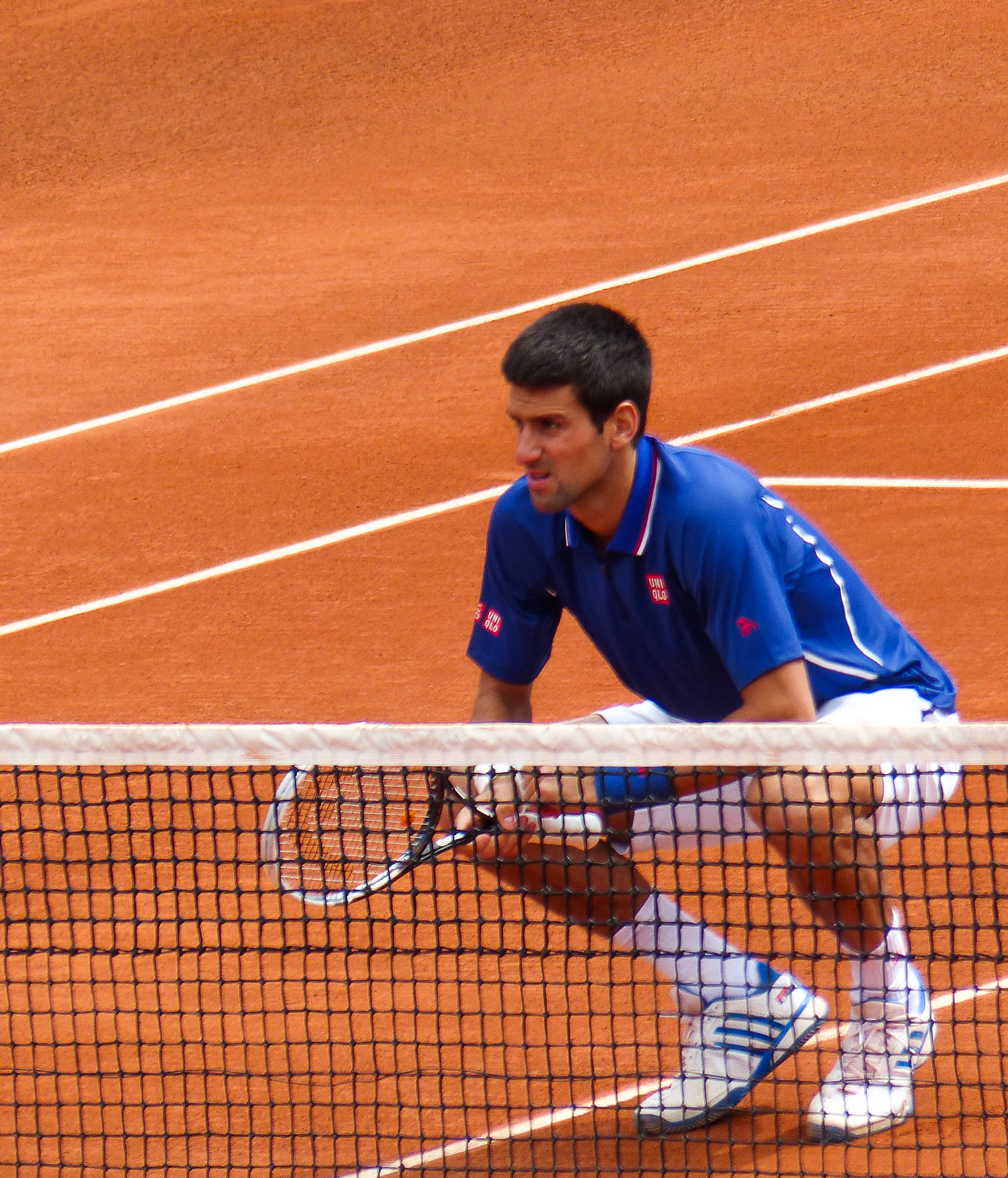 2ème tour Roland Garros 2013 : Novak Djokovic (SRB) def. Guido Pella (ARG)